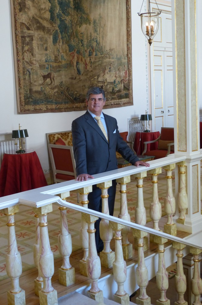 Imagen oficial del VI Duque de Loué